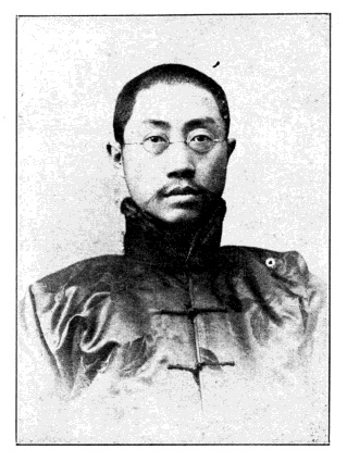 中文（台灣）: 中華民國國會議員中華民國國會議員